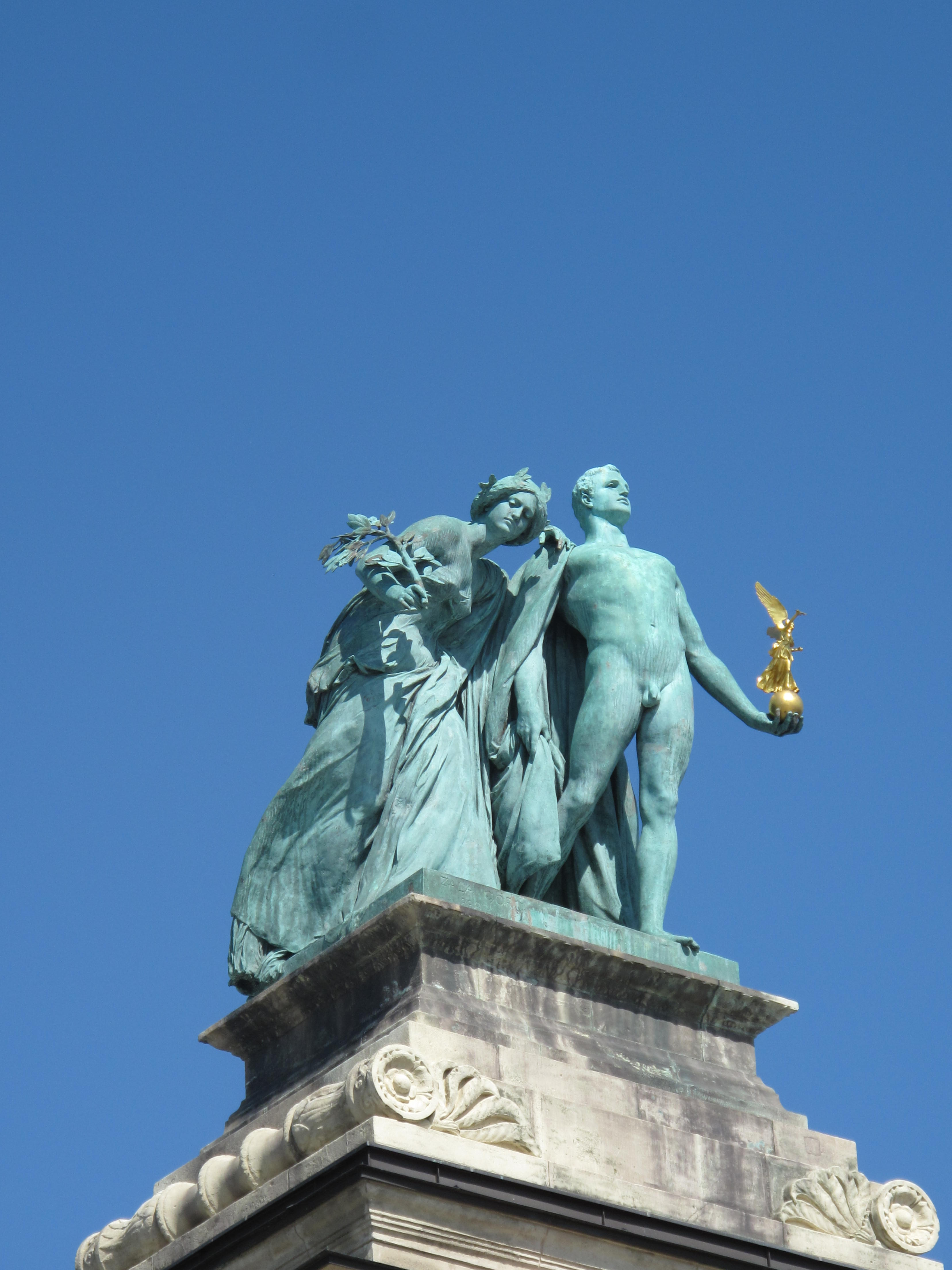 Náměstí Hrdinů, Budapešť